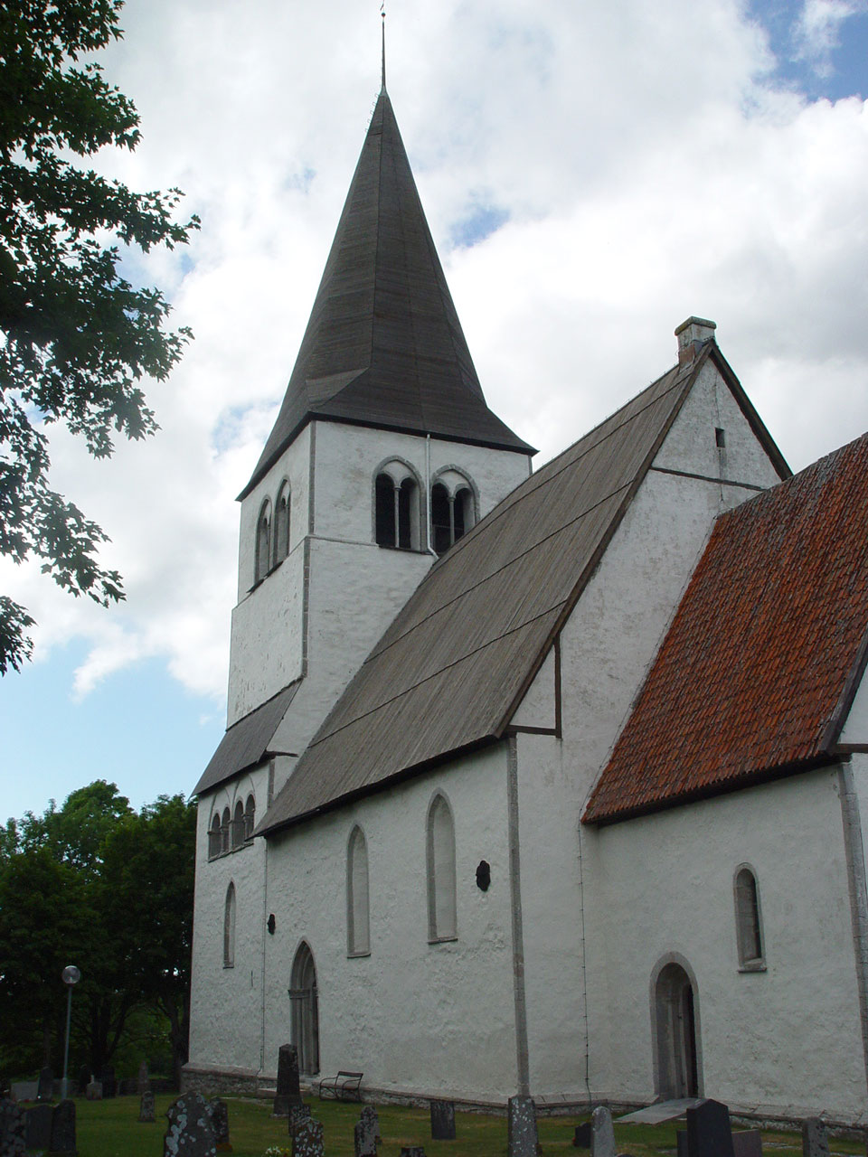 Rute Kirche (Gotland). Erbaut von 1235-1260